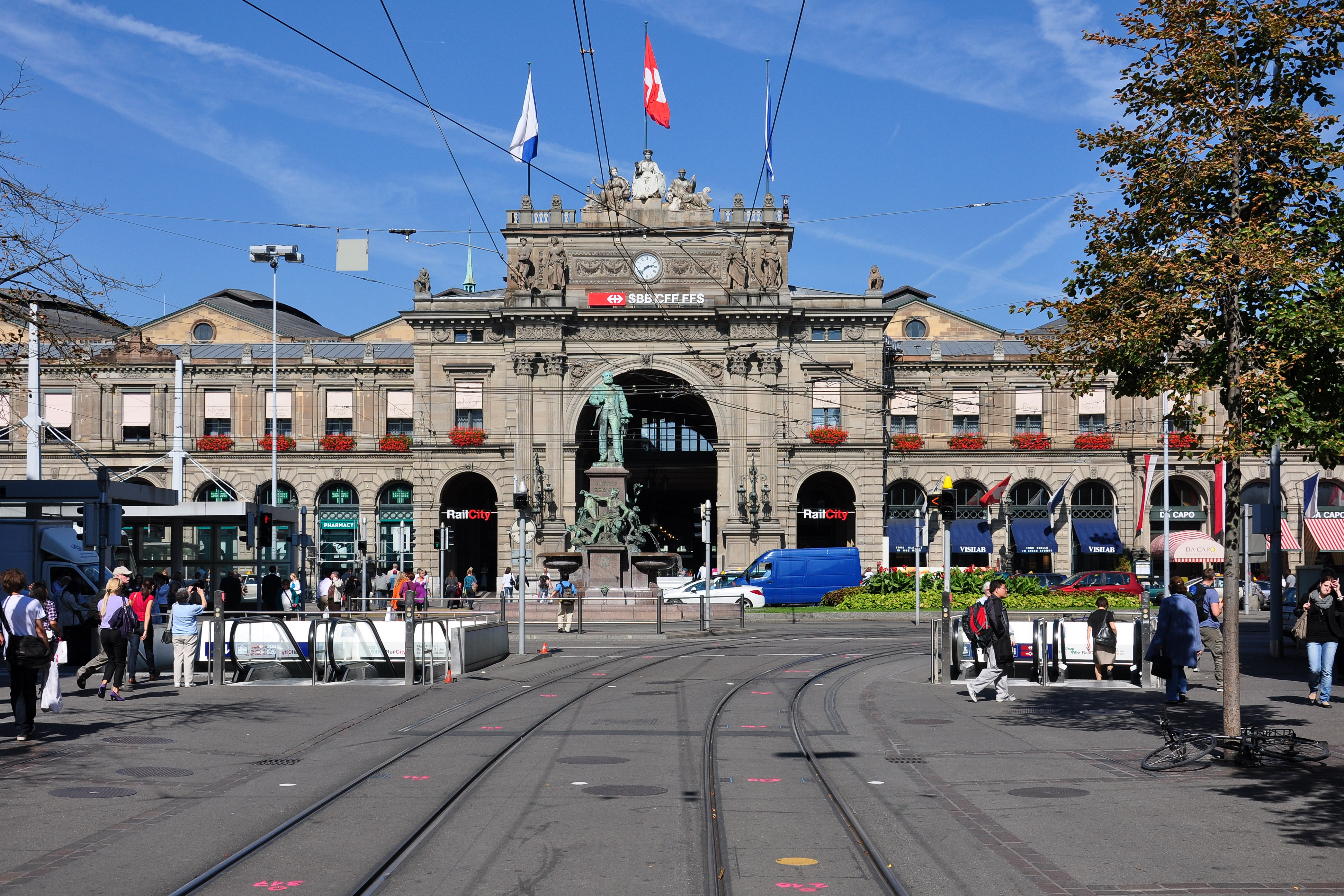 Bahnhofstrasse in Zürich (Switzerland) towards Hauptbahnhof